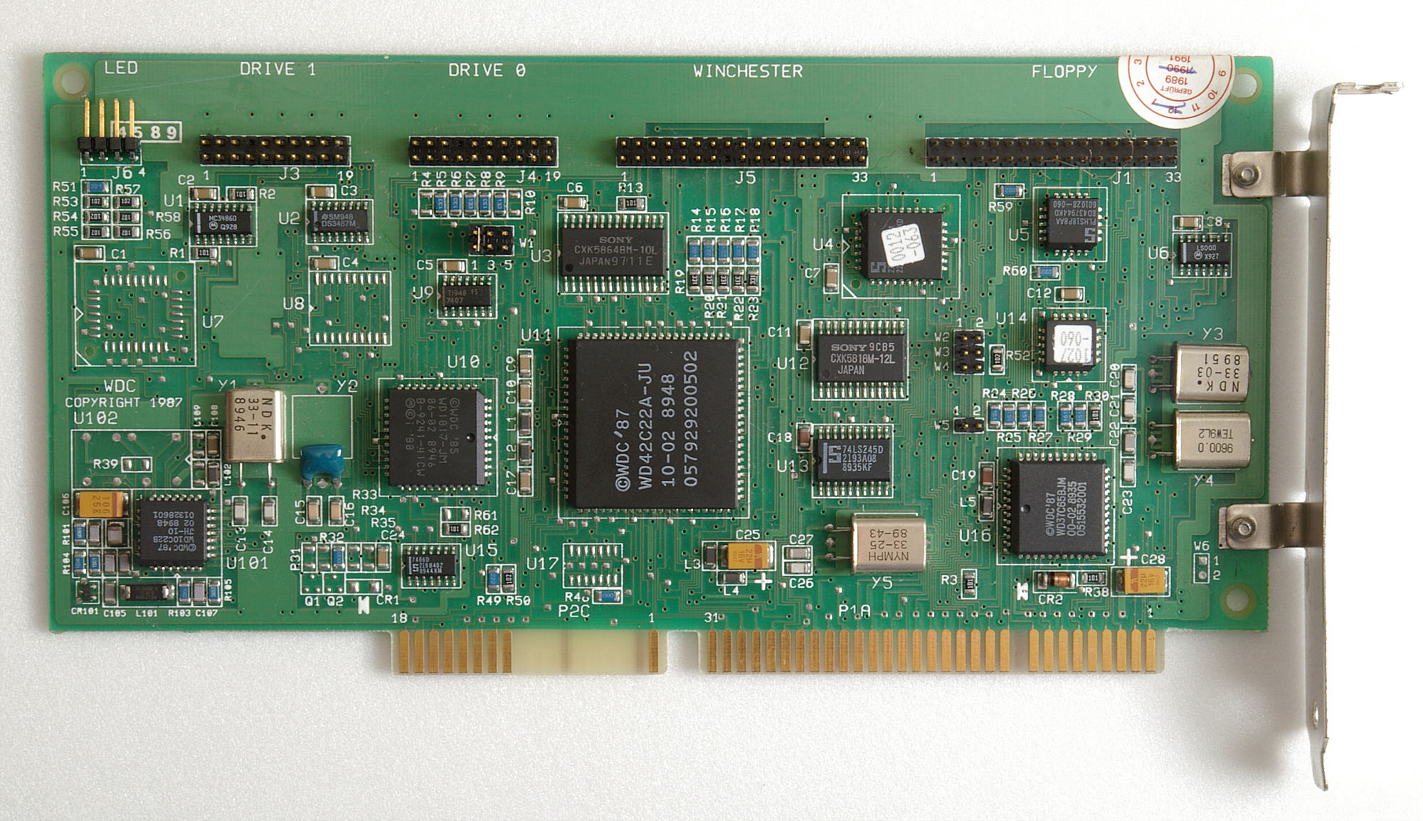 WD1006 MFM-Controller, 16-Bit ISA Bus